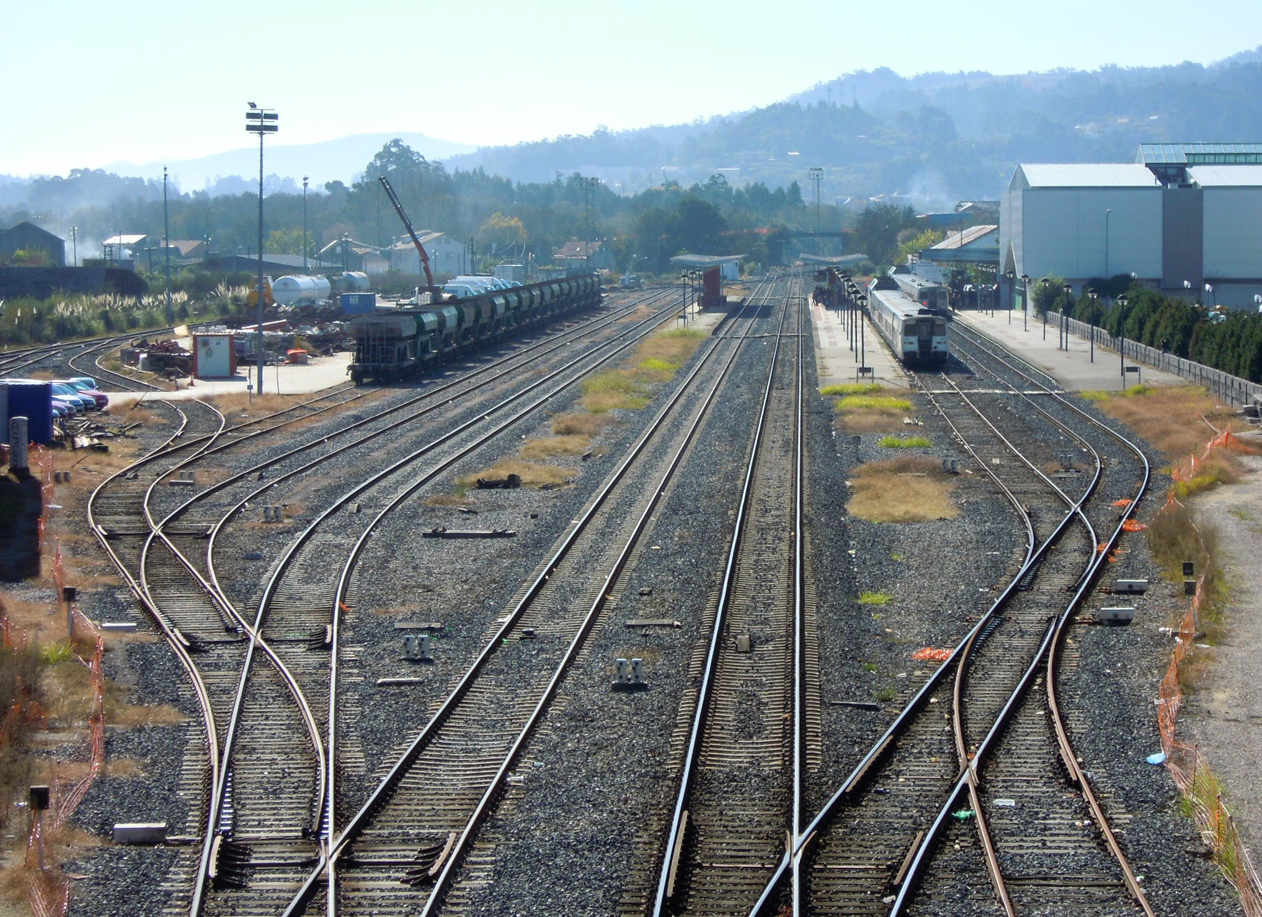 Estación de ferrocarril de Pontevedra